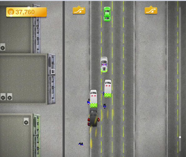 Screenshot The Heist 2